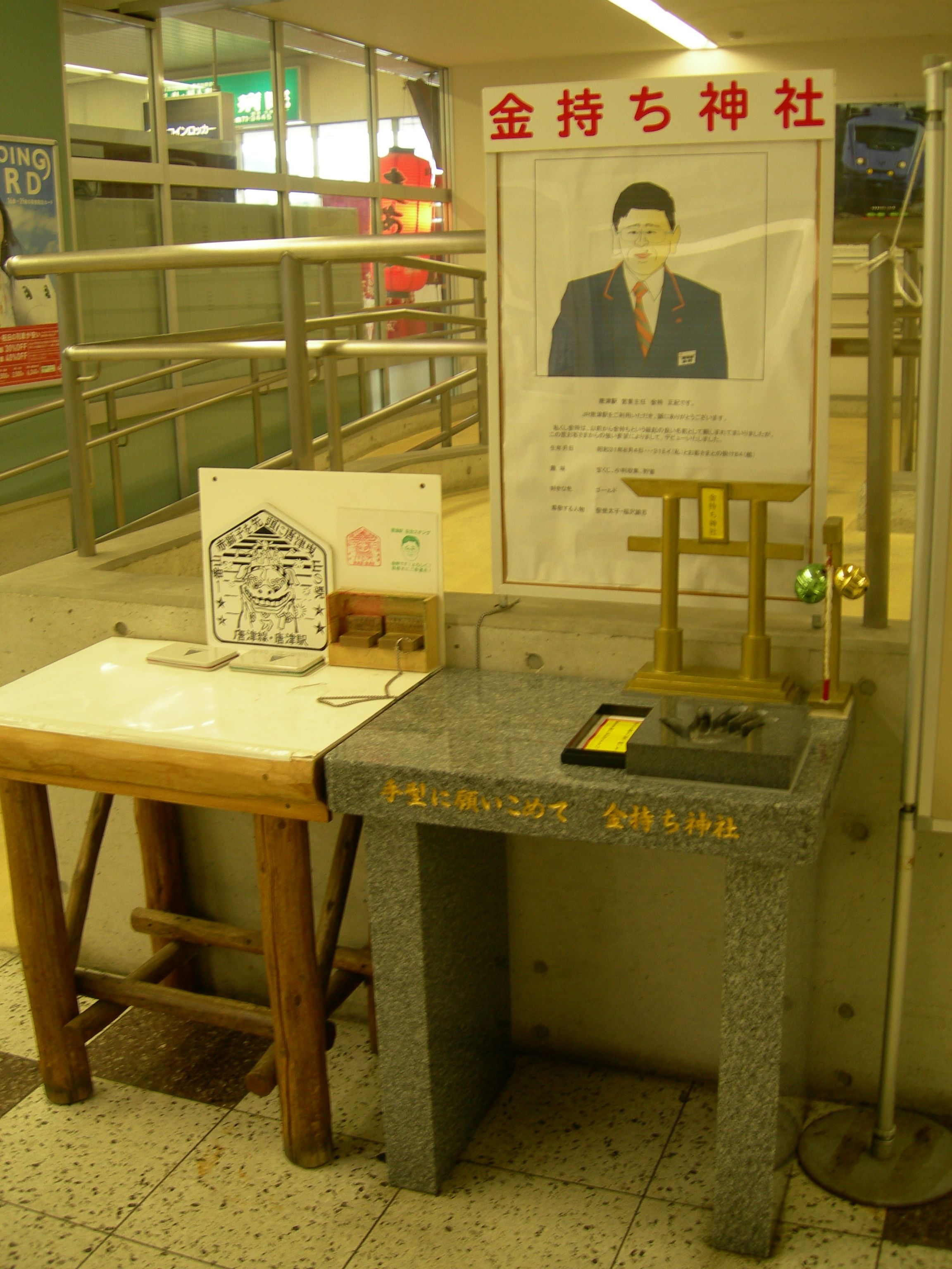 JR九州唐津駅 「金持ち神社」